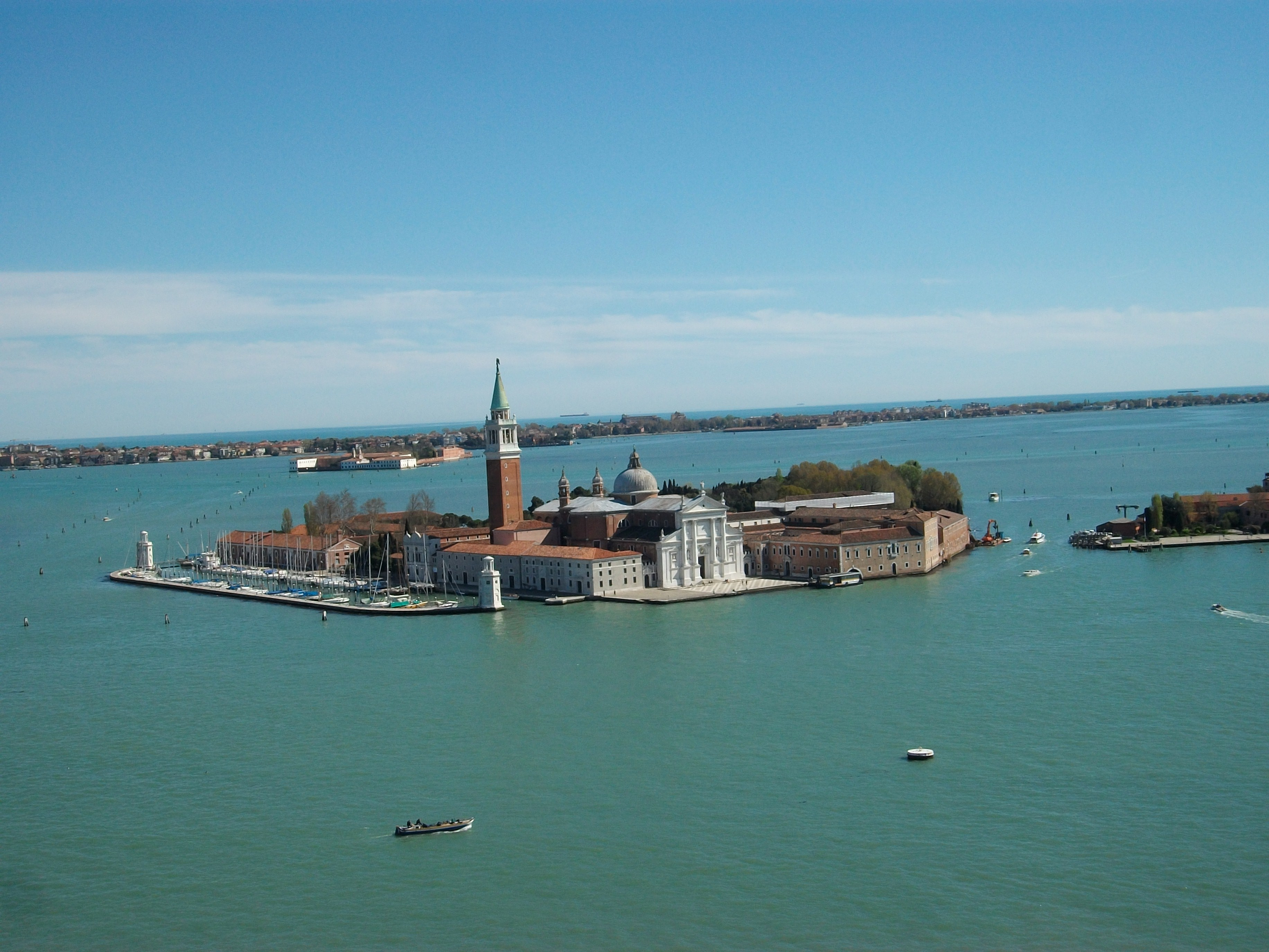 Illa de San Giorgio Maggiore (Venècia).